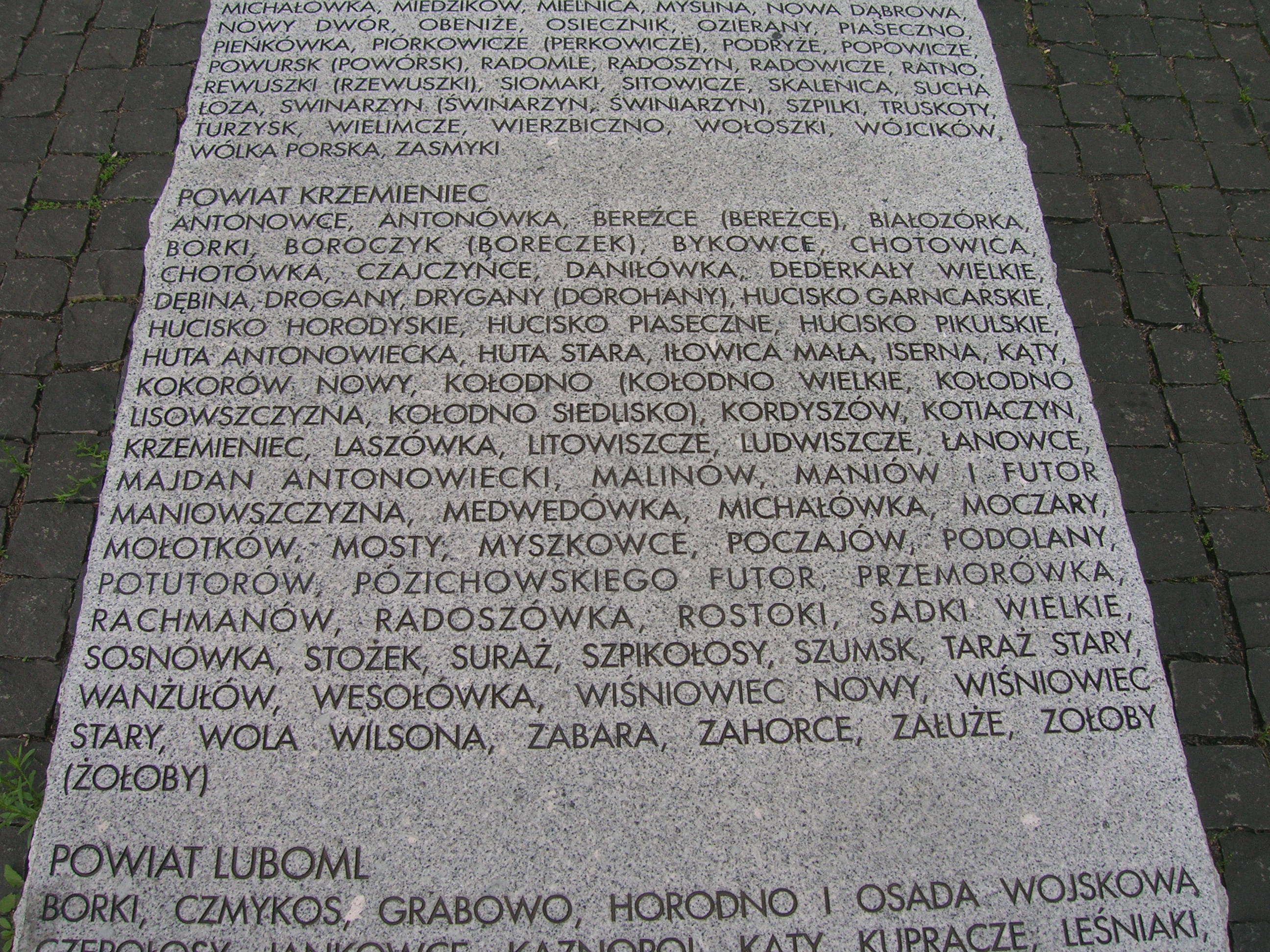 tablica powiat Krzemieniec